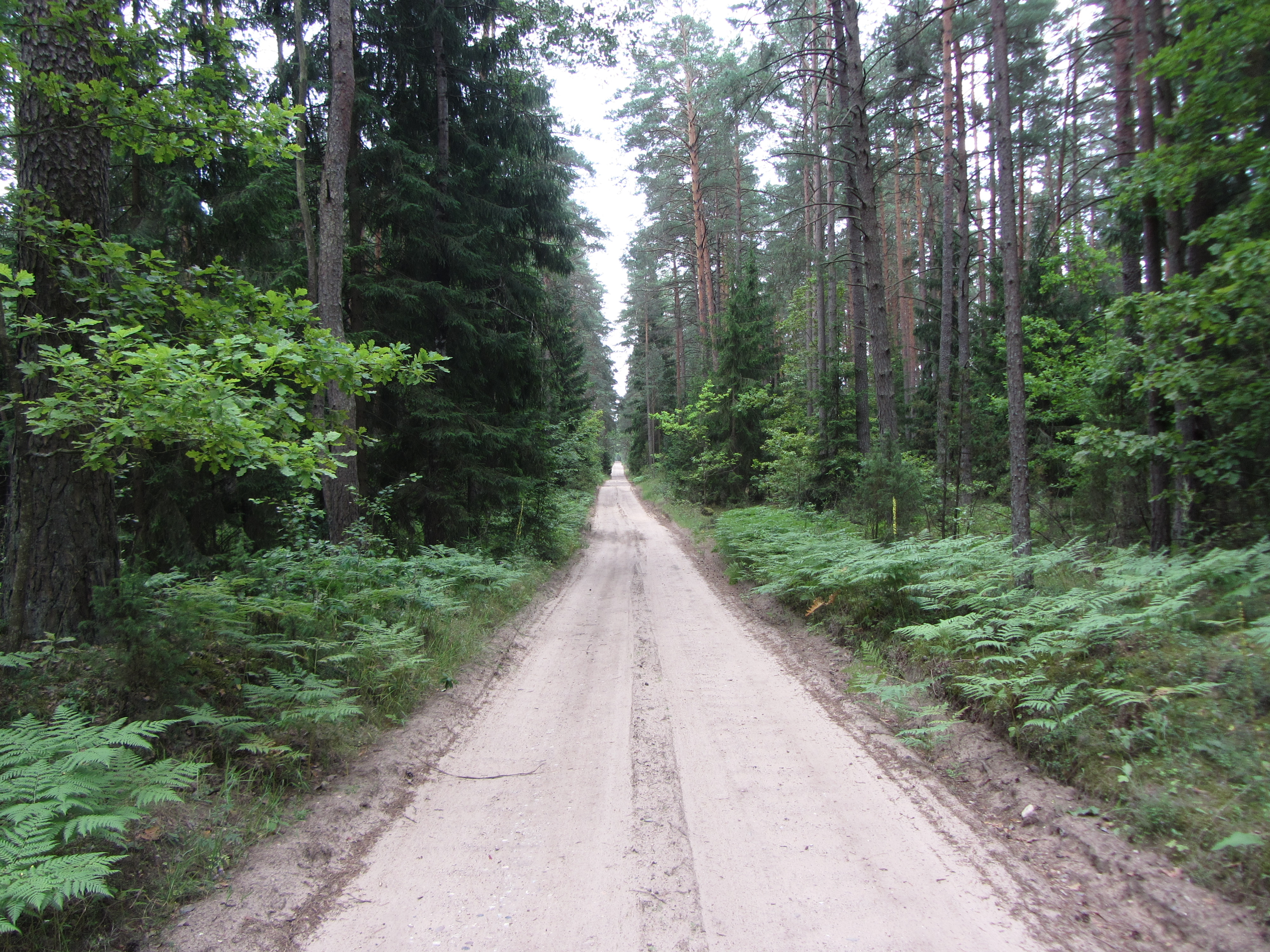 Kapčiamiesčio sen., Lithuania